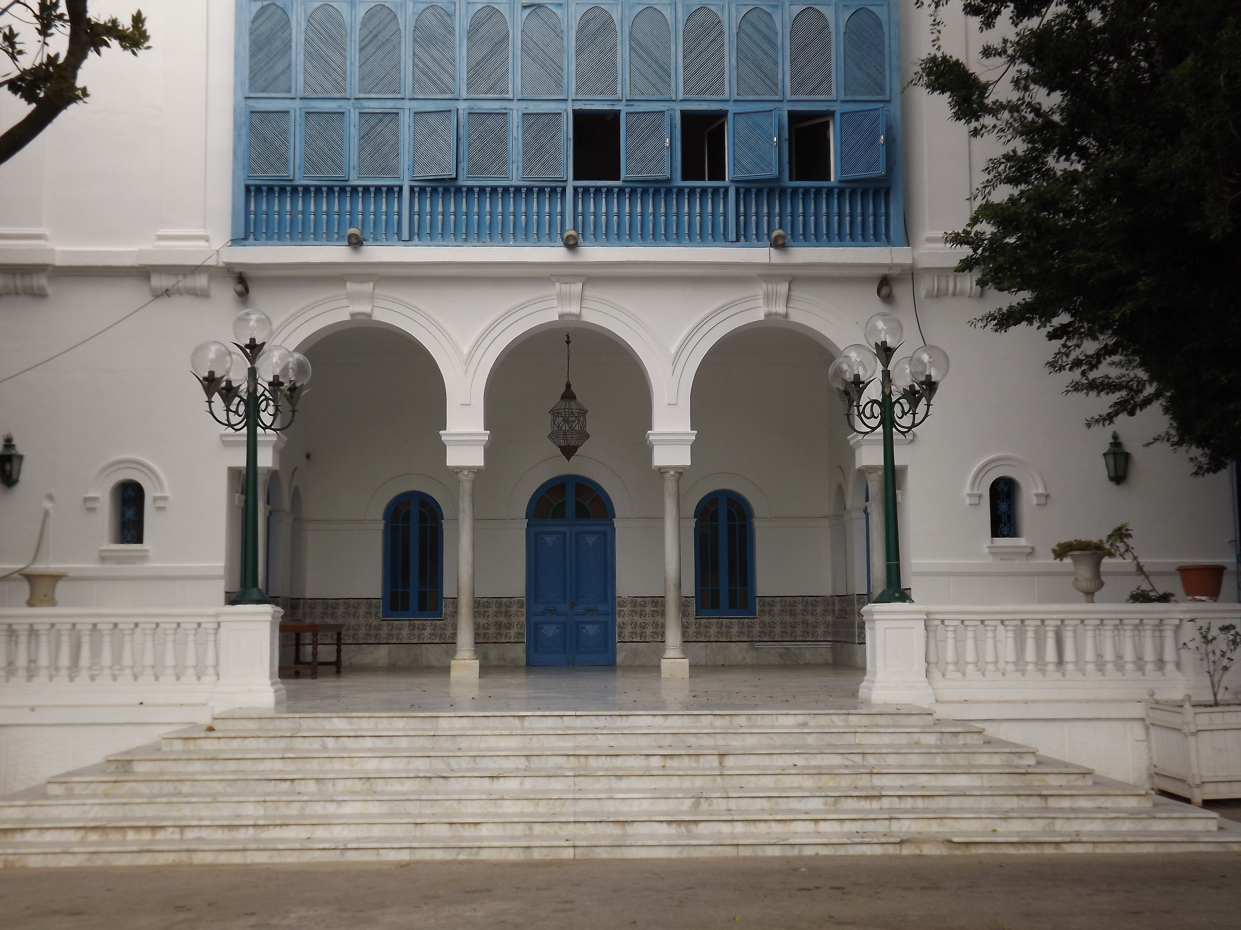 Partie historique dit « Kasr Essaâda » à La Marsa avec une zone de servitude étendue jusqu’à la clôture du palais conformément à l’article 45 du code du patrimoine